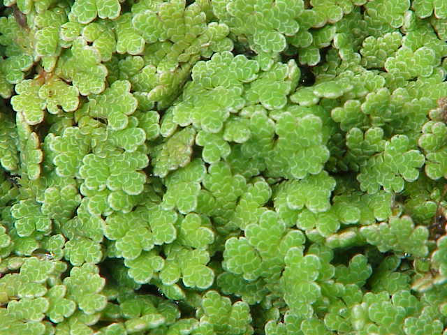 Species: Azolla filiculoides Family: Azollaceae Image No. 3